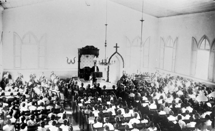 Repronegatief. Instituering Madjeles Agoeng (Javaanse Synode) te Mojowarno, Oost-Java.